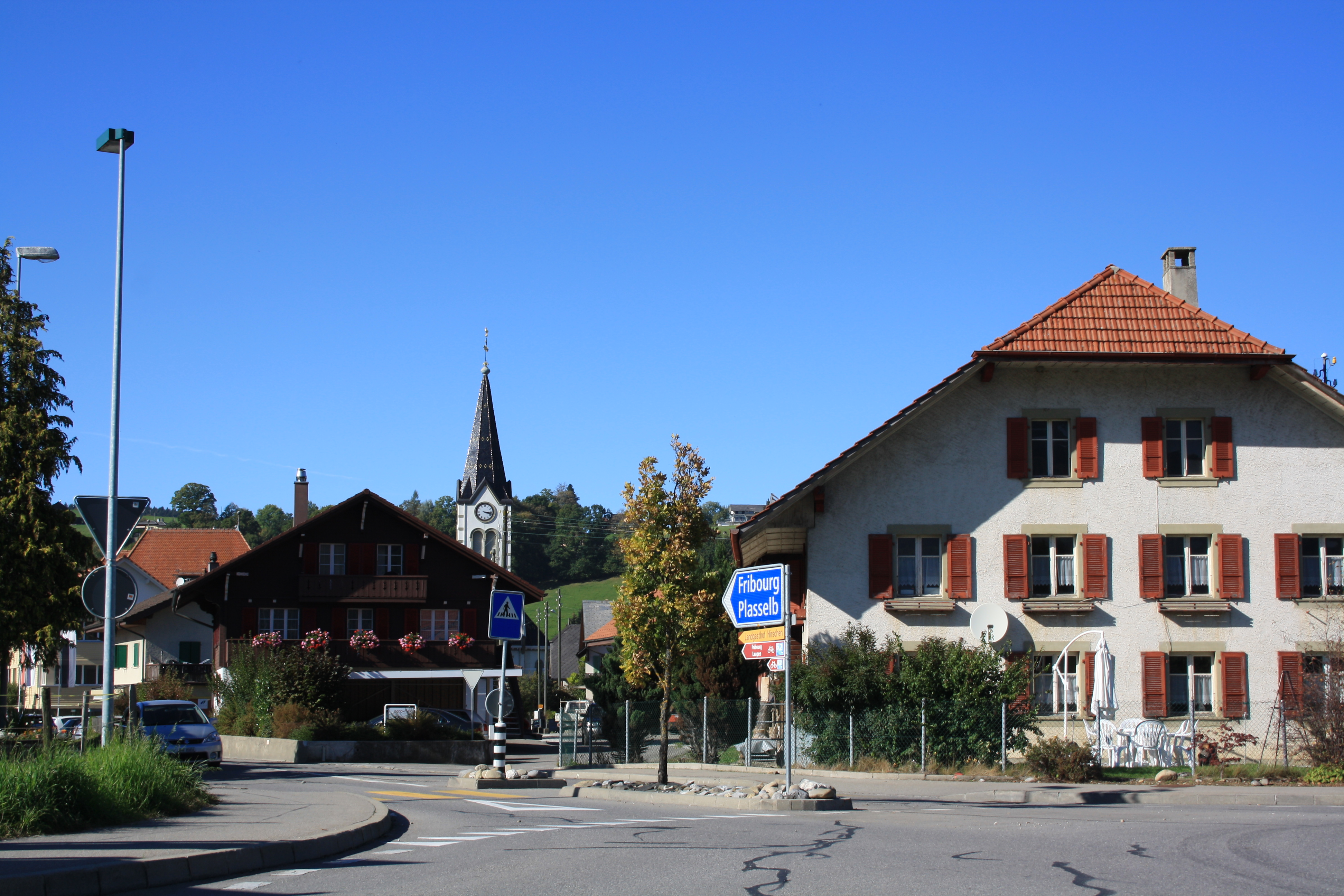 Plaffeien